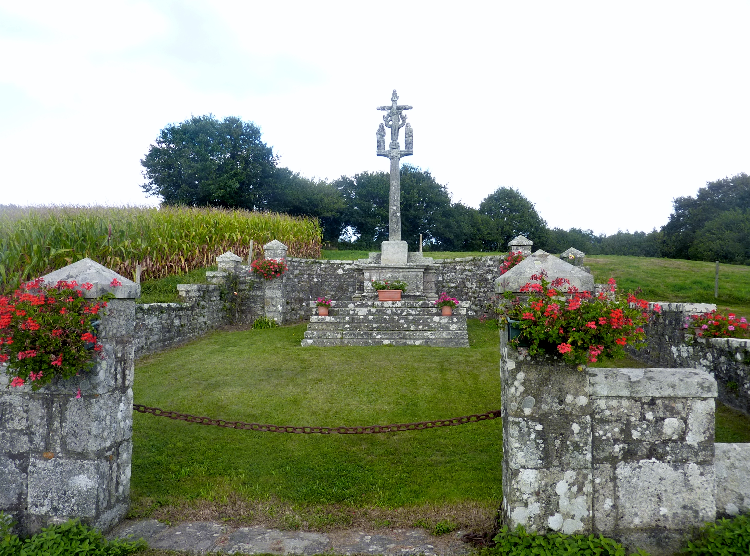 Landudal : clavaire du XVIème siècle situé au nord-ouest du bourg (fût gravé d’une longue épée. Croisillon, écu, la Vierge et Jean. Croix, branches rondes, crucifix, anges aux calices, Vierge à l’Enfant). Inscription commémorant la mission de 1957. Le calvaire est dans un enclos entouré de murs.